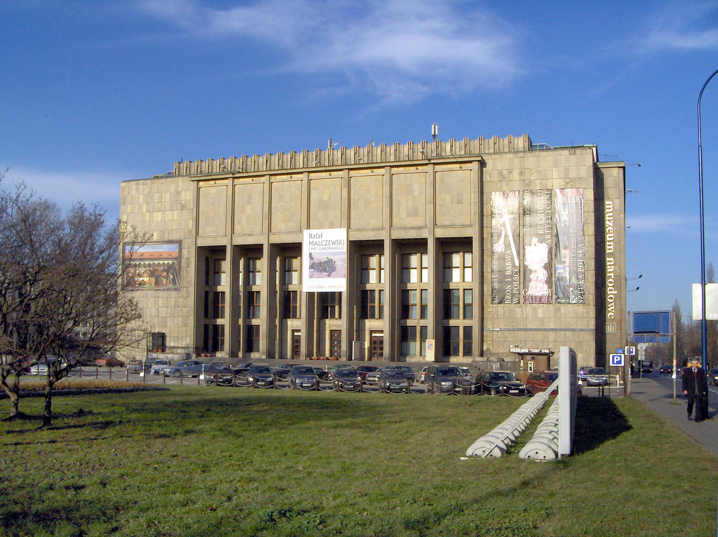 Gmach główny Muzeum Narodowego w Krakowie przy alejach Trzech Wieszczów .